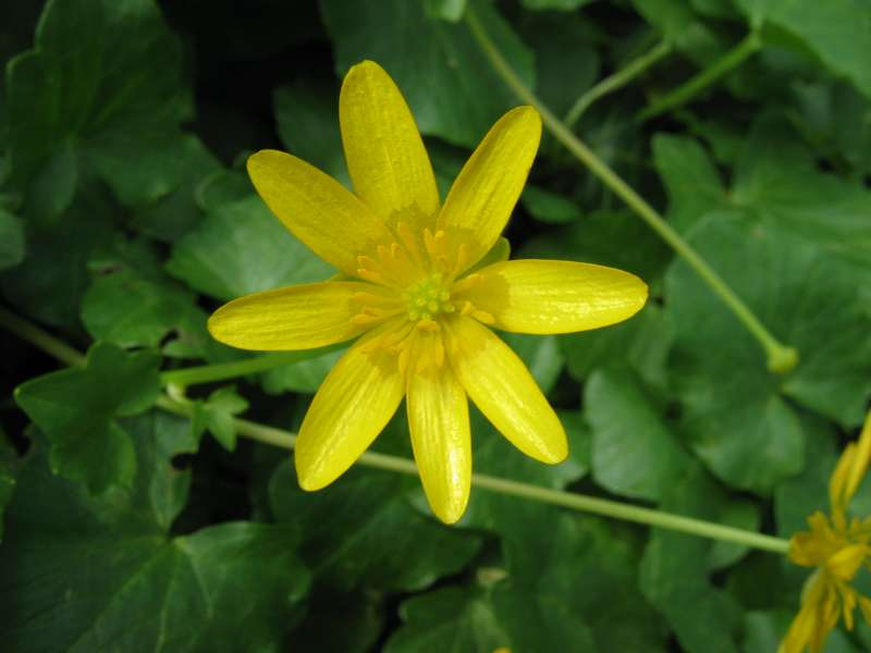 Scharbockskraut (Ranunculus ficaria)